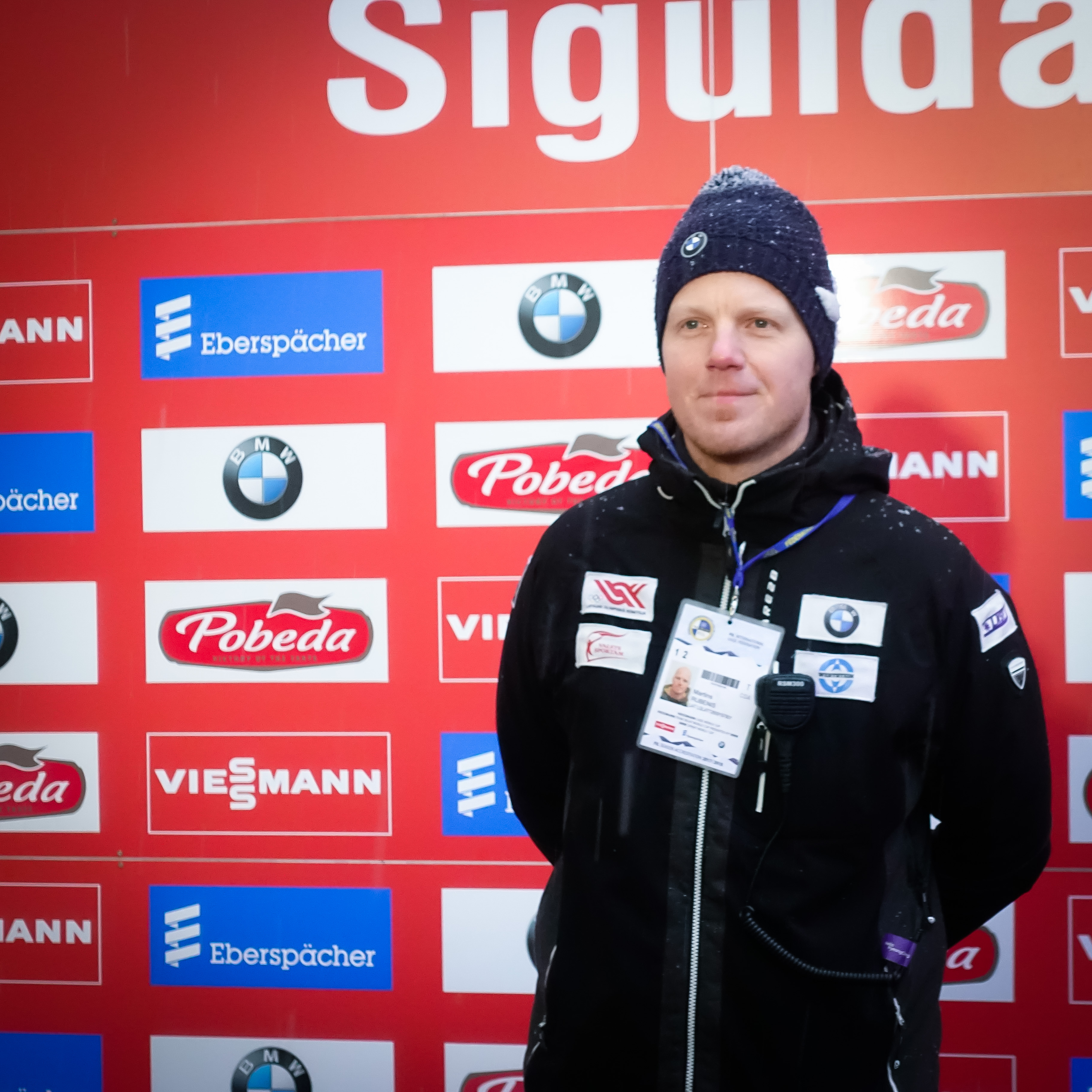 Divkārtējais olimpisko spēļu laureāts kamaniņu braukšanā Mārtiņš Rubenis, Siguldā FIL Eiropas čempionāta / 9. Viessmann Pasaules kausa posma laikā.